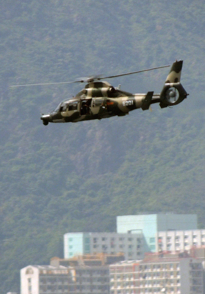 駐港部隊航空兵團-直9-ZH